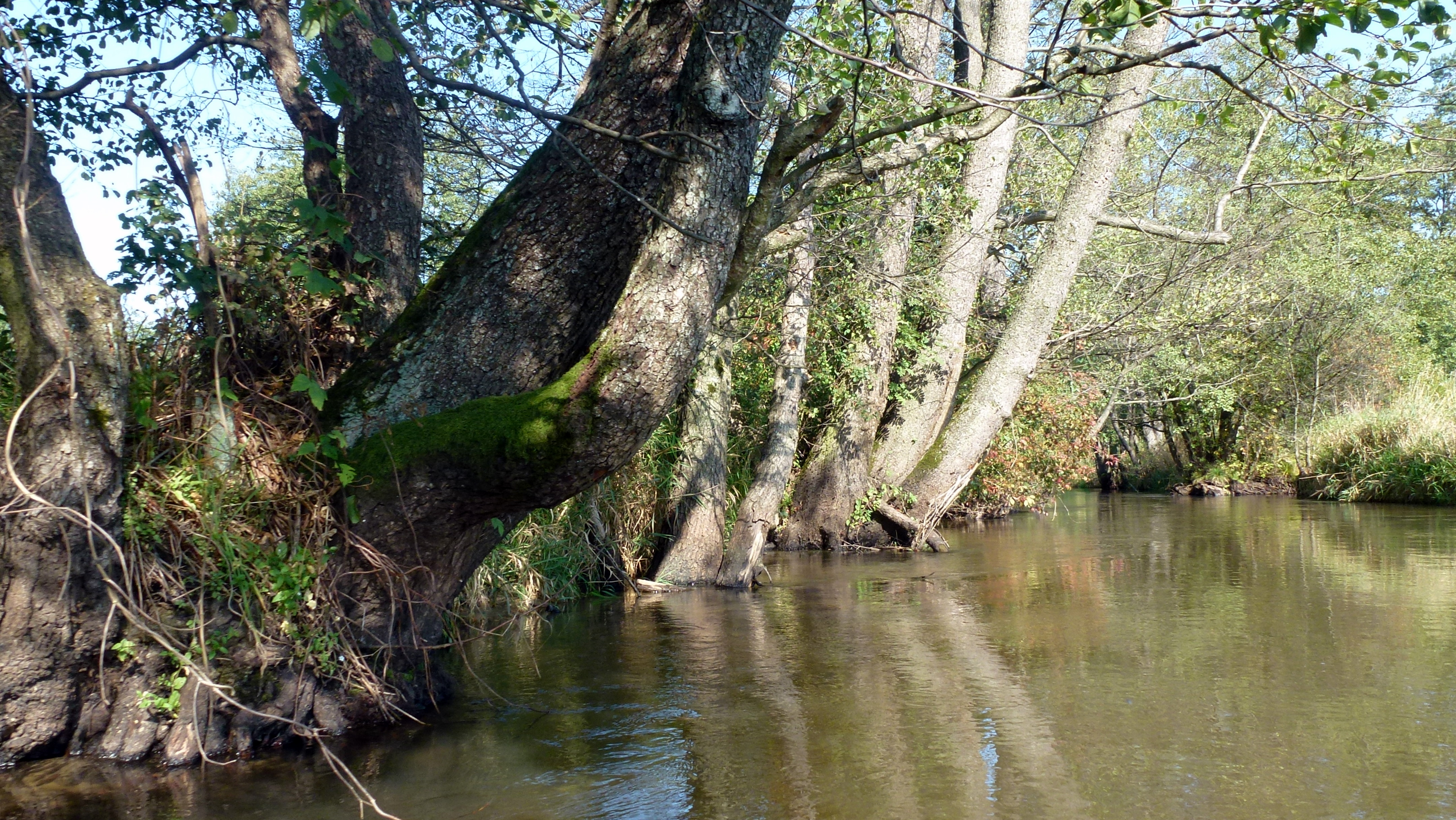 Wieprz, Roztoczański Park Narodowy